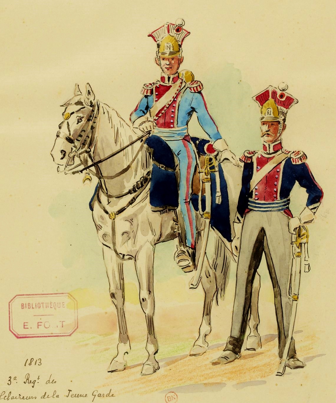 Trompette et maréchal des logis du 3e régiment d'éclaireurs de la Garde impériale, 1813. Types réalisés d'après ceux de la collection alsacienne Carl.